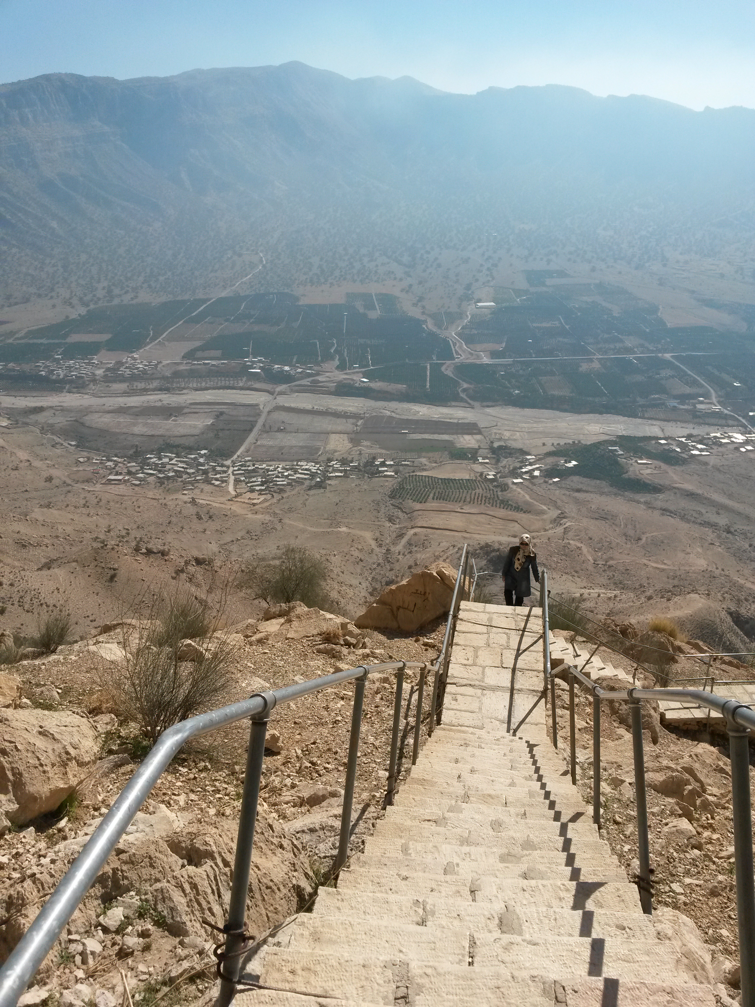 پلکان منتهی به غار شاپور جهت بازدید از مجسمه باستانی شاپور ساسانی در شهرستان کازرون. ایران stair to shapour cave in kazeroon ( iran) for visit of ancient statue of sassanid shapour